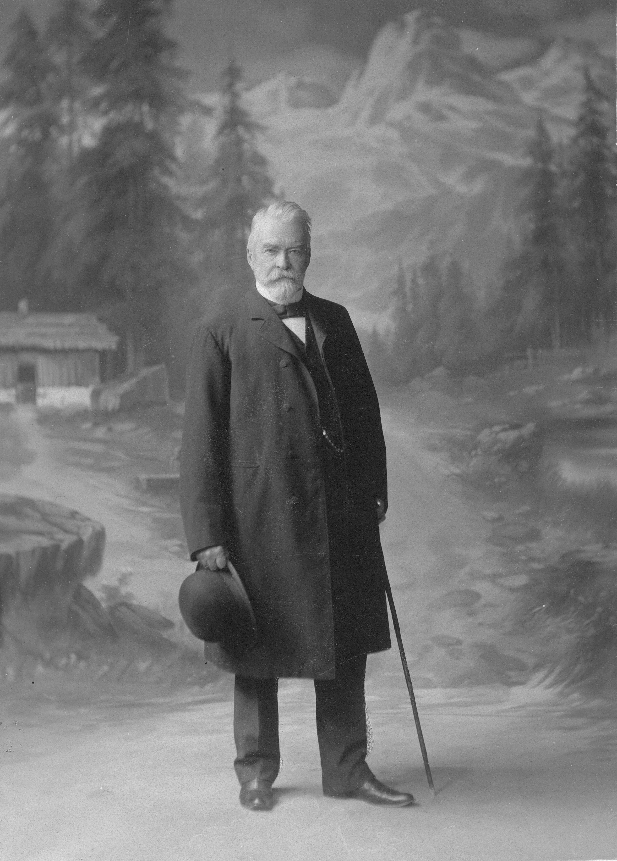 Johannes Christian Piene (1832–1912), industrigründer, grosserer og politiker (H).